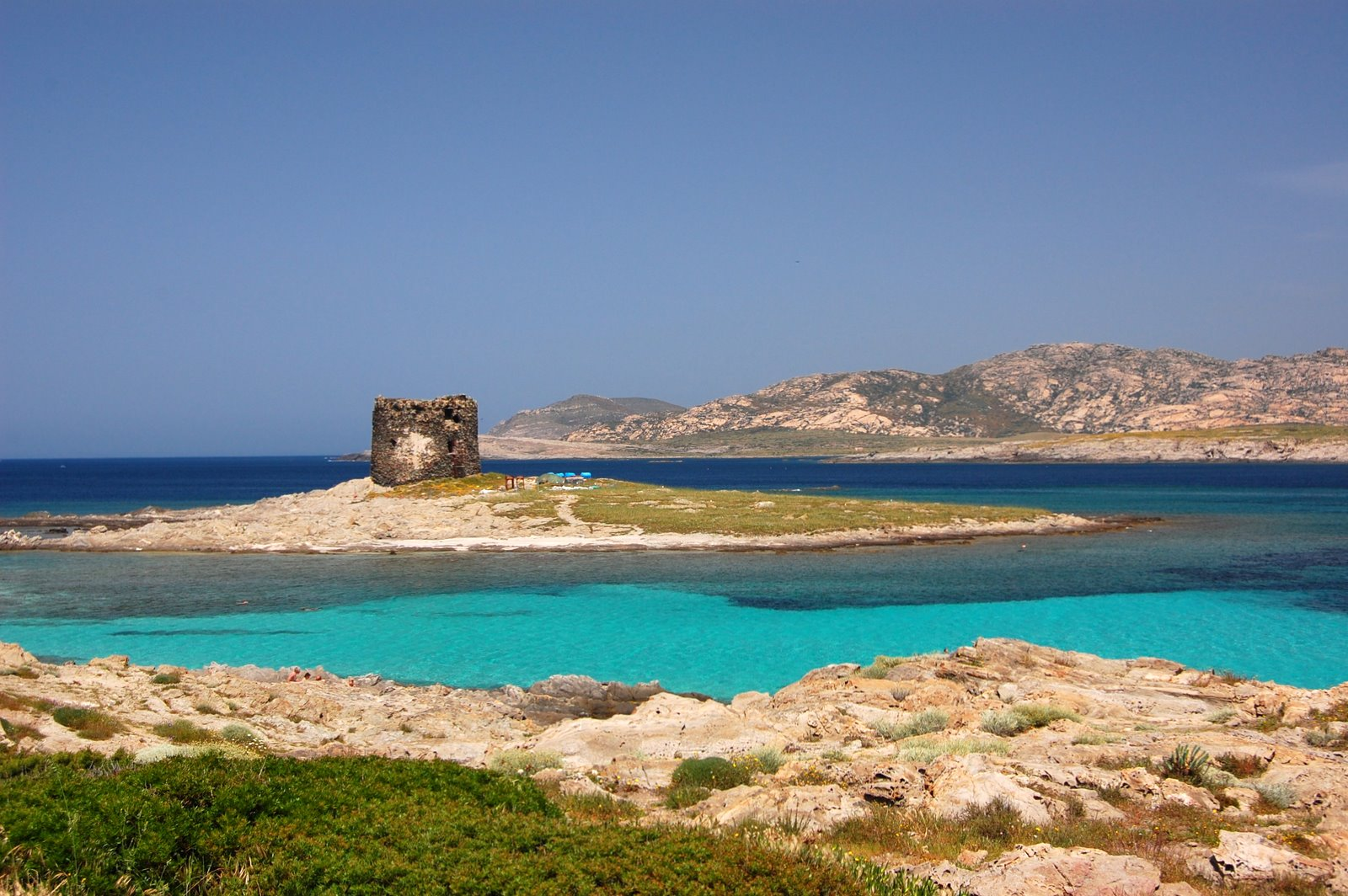 Stintino, La Pelosa beach